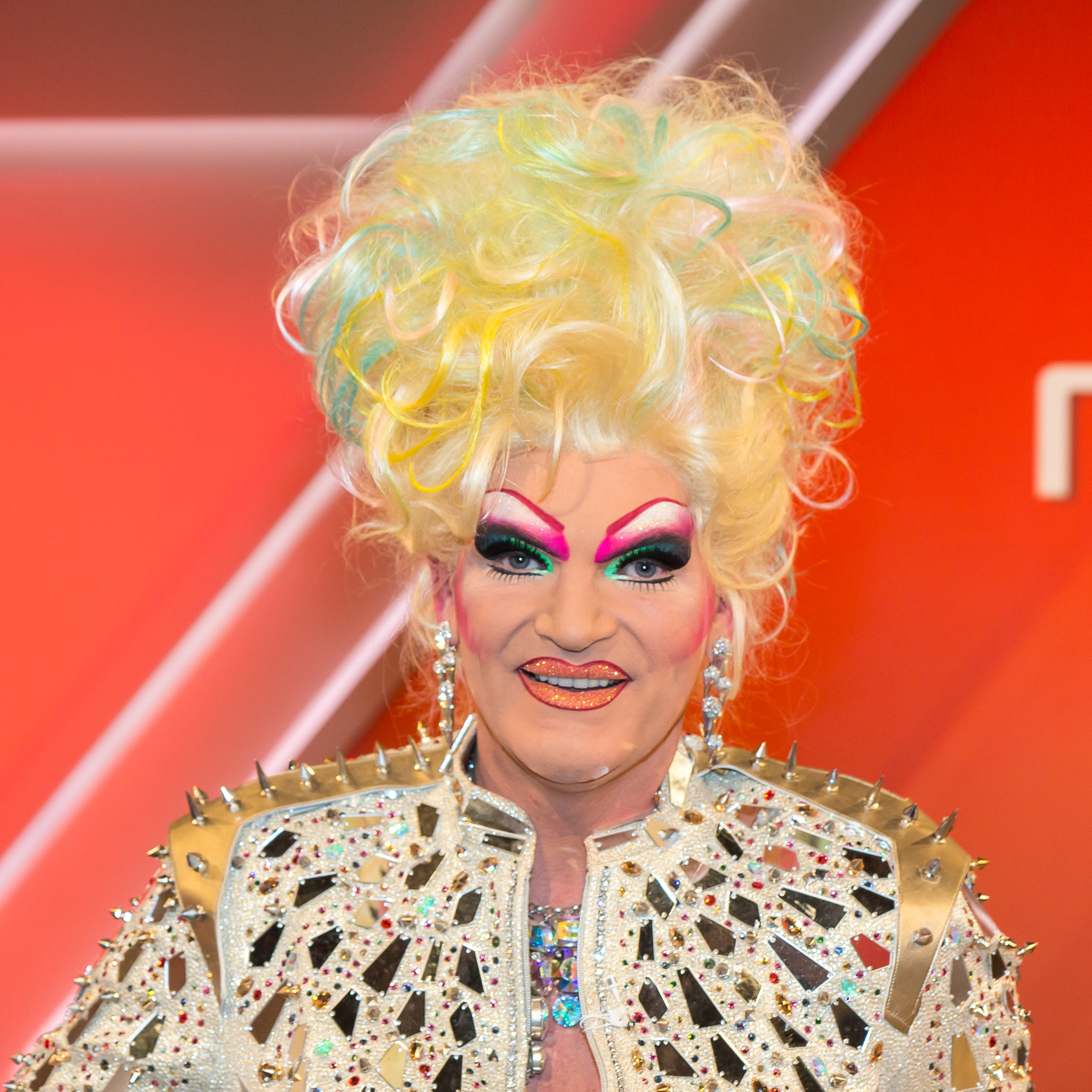 Maischberger, Sendung vom 13. Dezember 2017. Thema der Sendung: „Panikjahr 2017: Besser als befürchtet?“ Foto: Olivia Jones